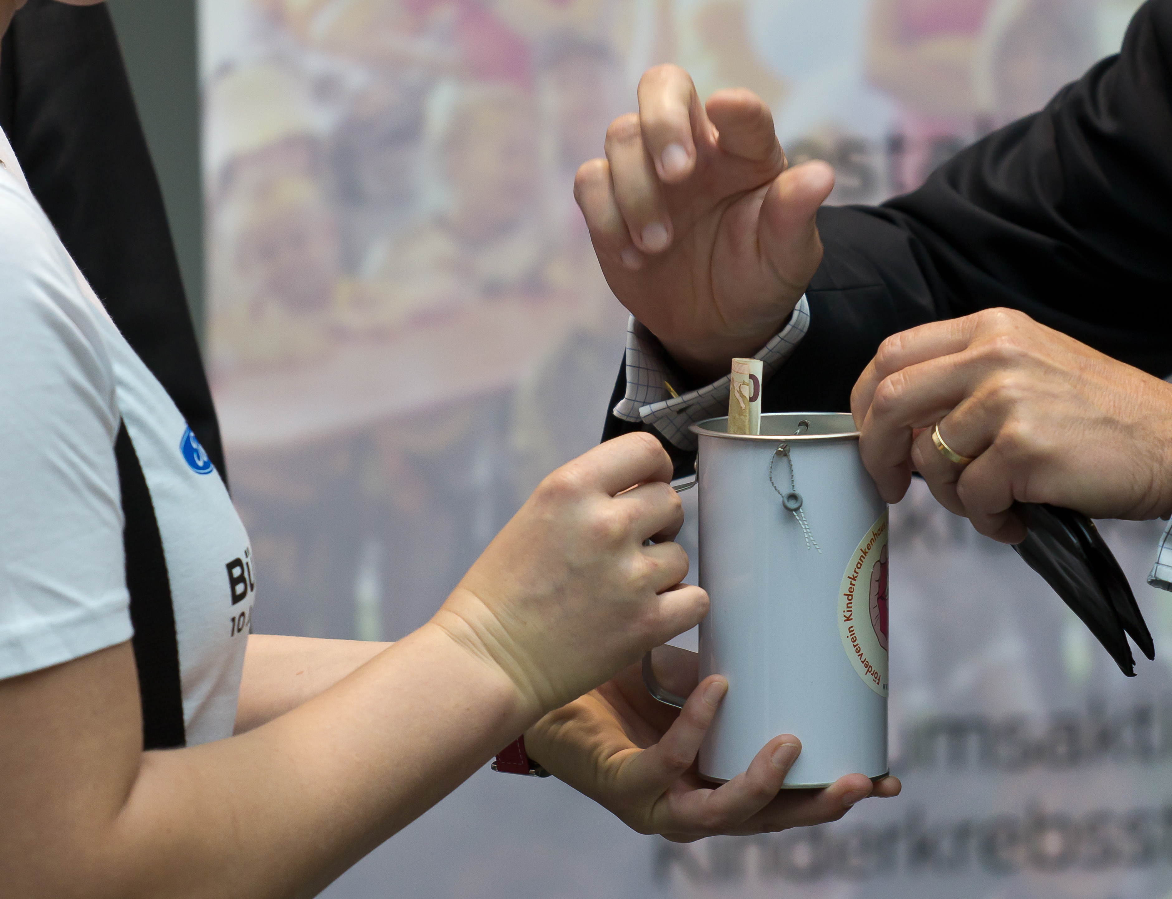 Start der Spendenaktion „Bündnis für Köln“ 2012 durch Oberbürgermeister Jürgen Roters und Ford-Geschäftsführer Bernhard Mattes im Kölner Rathaus. Der Erlös soll der Kinderkrebsstation der Kinderklinik an der Amsterdamer Straße zugute kommen. Foto: Ein 50-Euro-Schein wird als Spende in die Spendendose gesteckt.